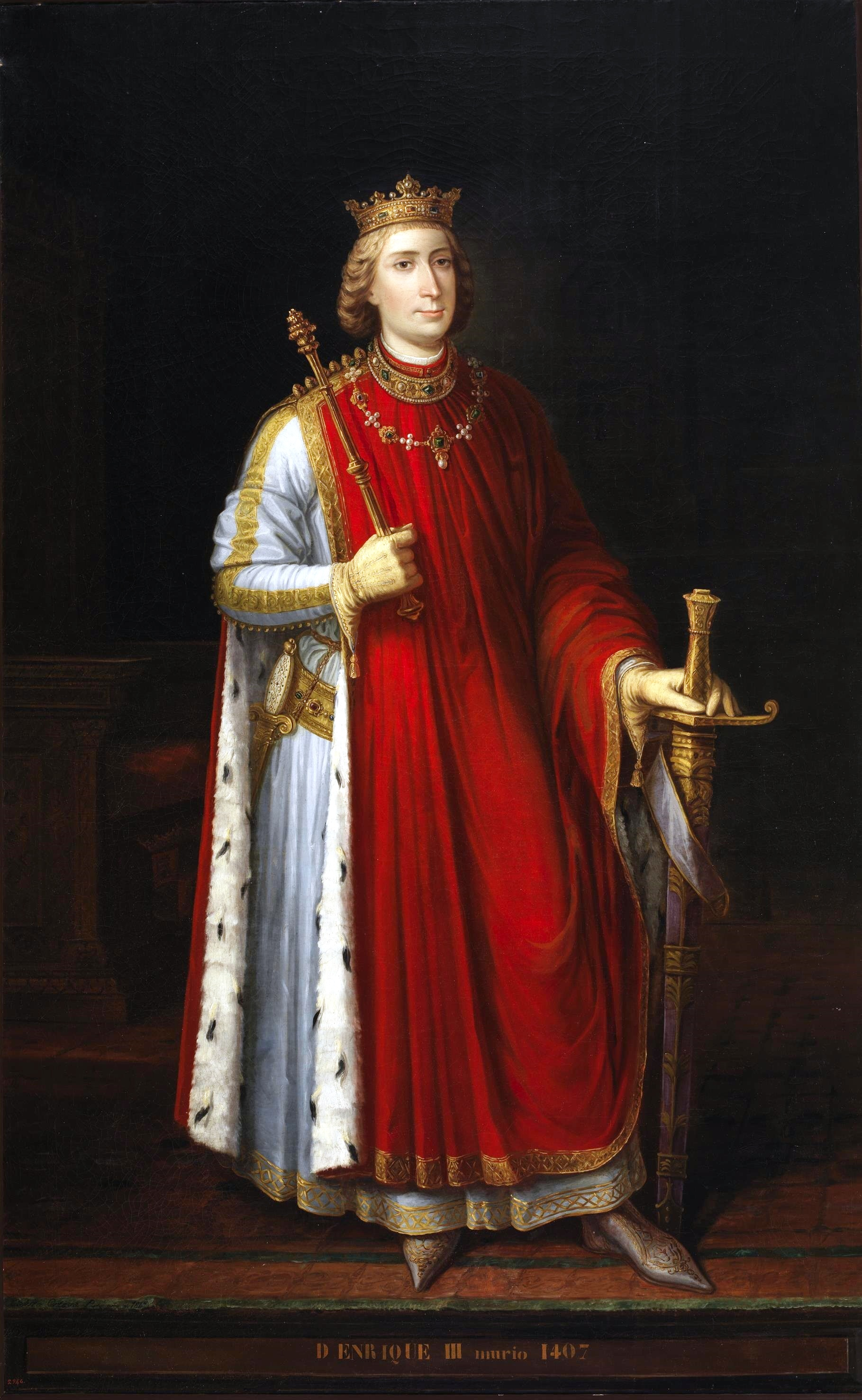 Retrato imaginario del rey Enrique III de Castilla (1379-1406), hijo y succesor del rey Juan I de Castilla.